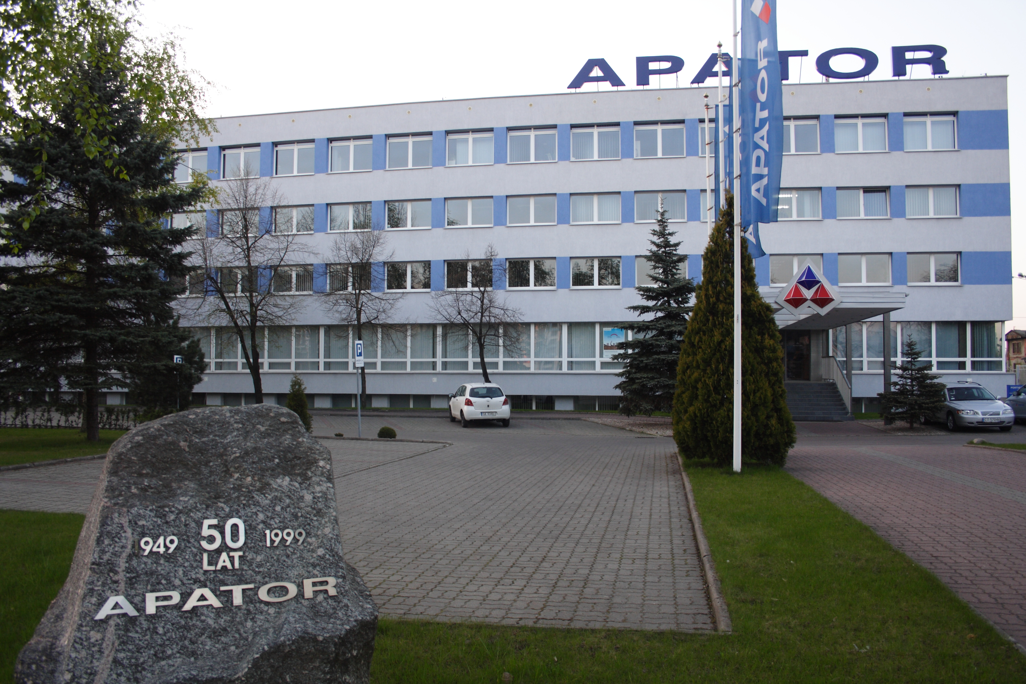 Nieistniejący biurowiec zakładów Apator przy ul. Żółkiewskiego w Toruniu.